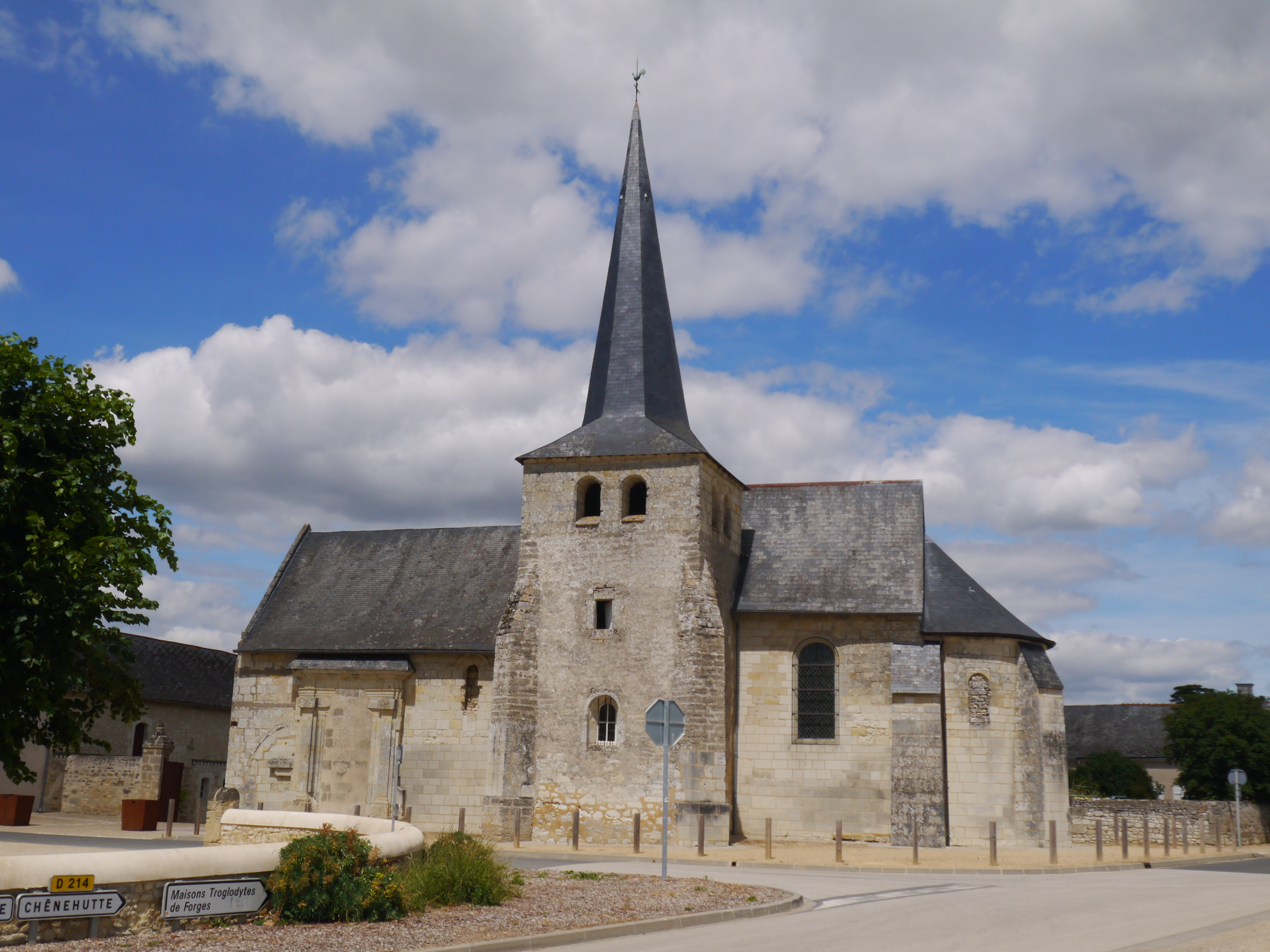 L'église Saint-Laurent.